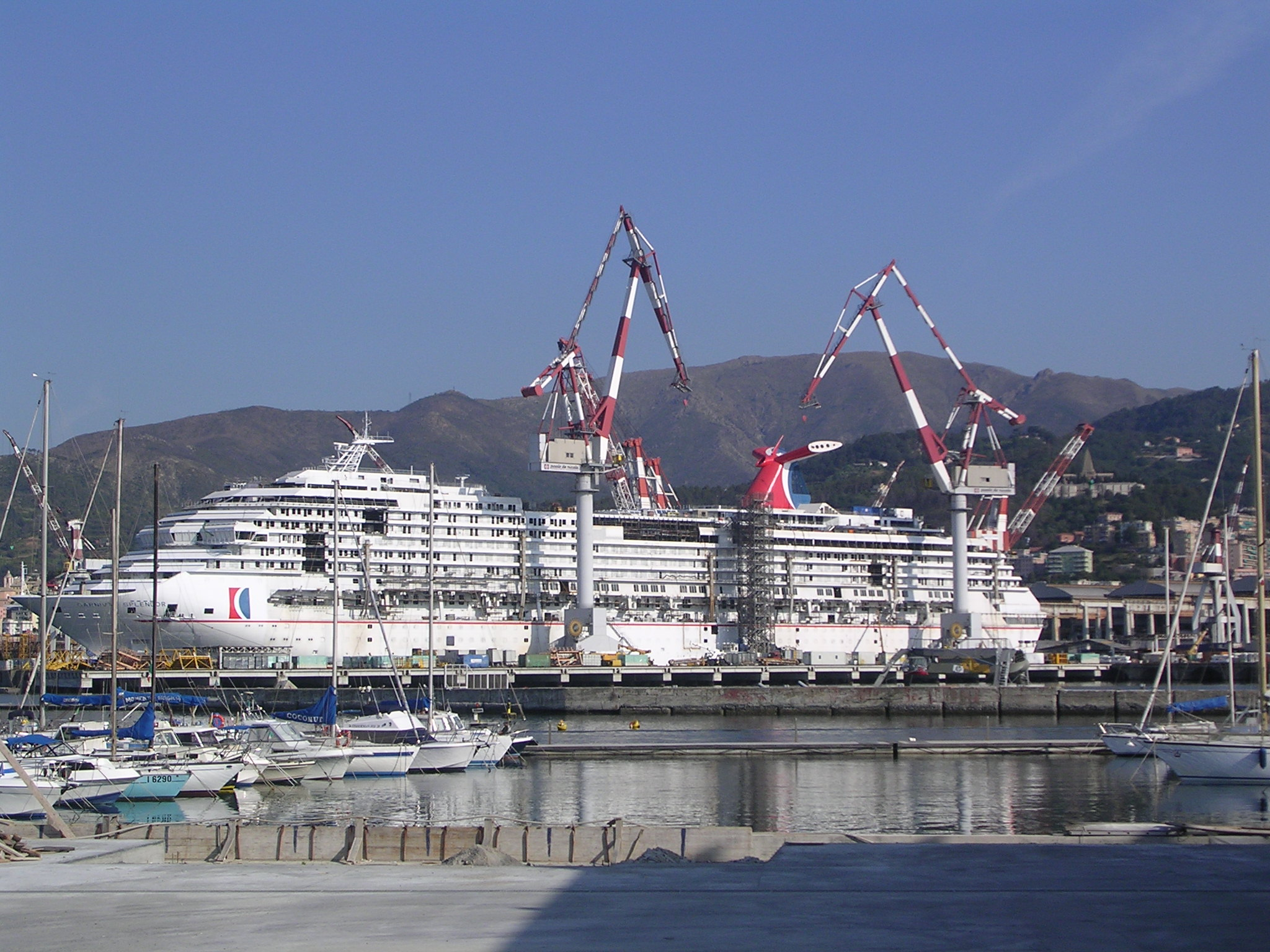 La Carnival Splendor in costruzione nei Cantieri navali di Sestri Ponente